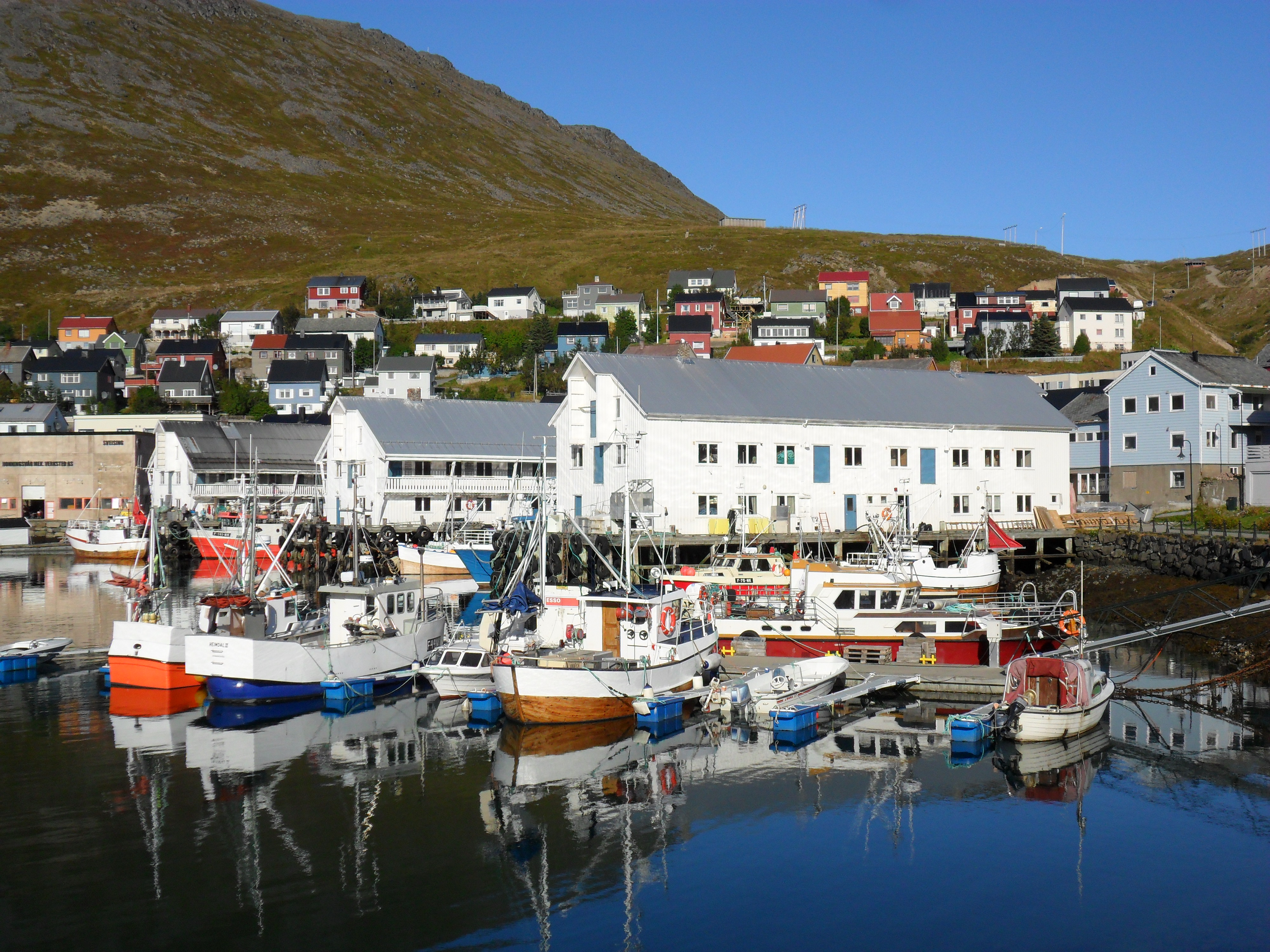 Sjøhus i Honningsvåg, Nordkapp kommune, bygget i årene 1953-1961